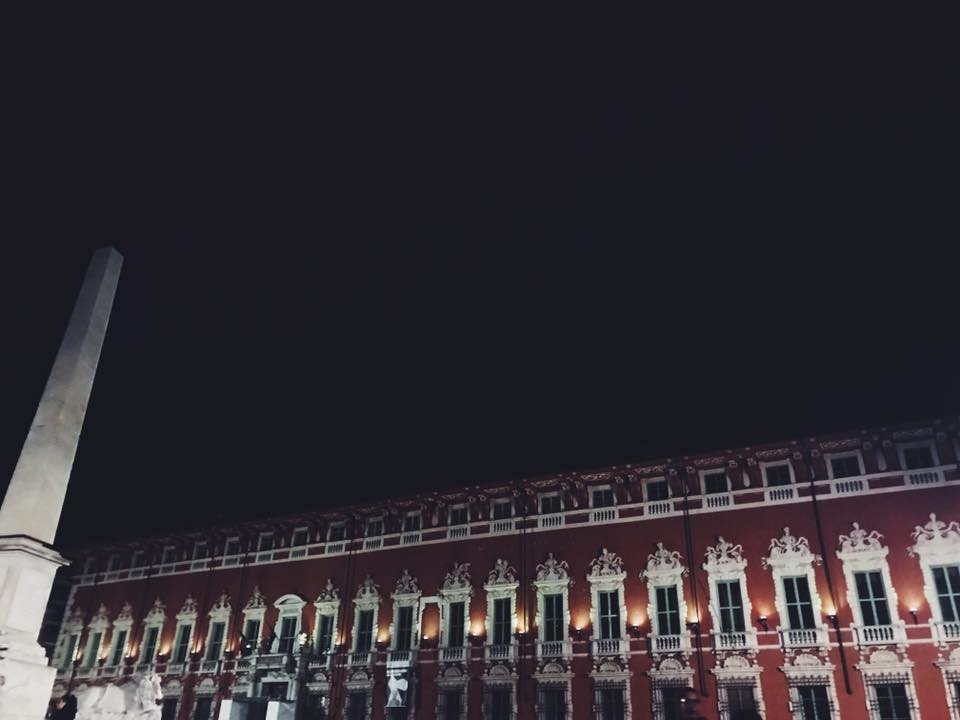 Palazzo Ducale di sera